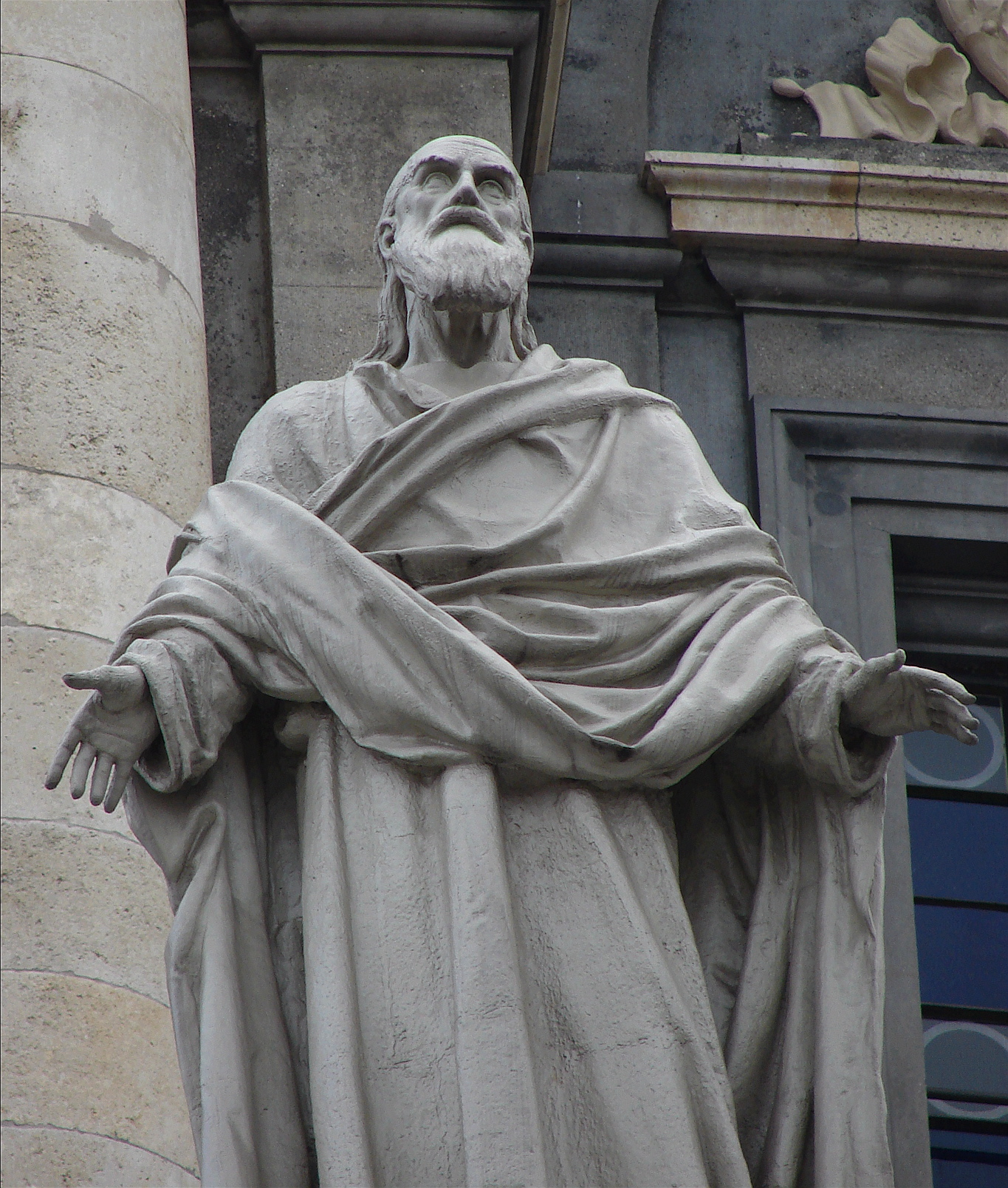 Polykarp, Ferdinand Edvard Ring 1884, Frederikskirken, Marmorkirken, Frederikstaden, København